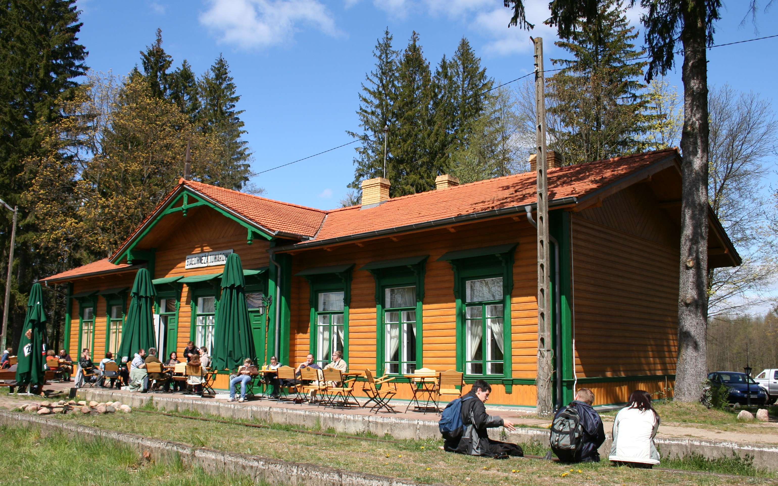 "restauracja Carska" w Białowieży